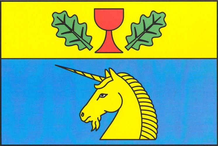 vlajka Libenice